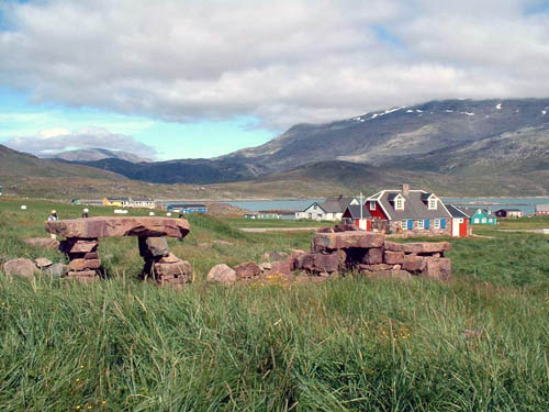 Reste des Bischofsitzes in Igaliku